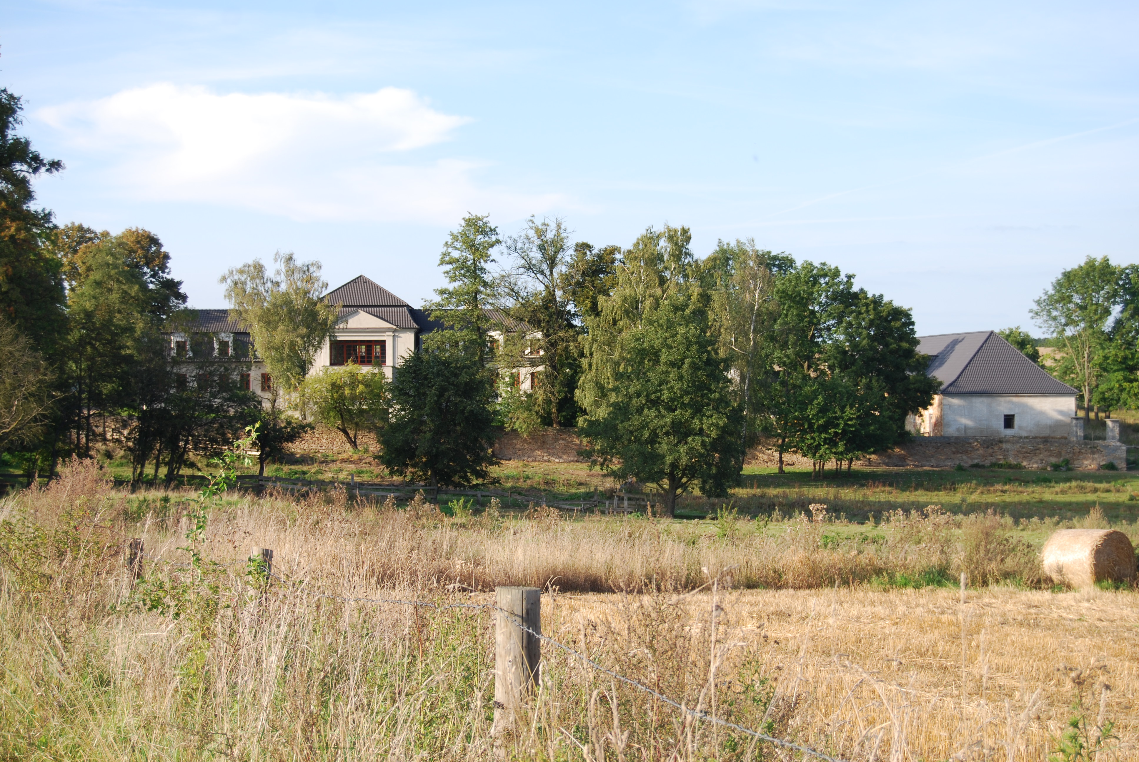 Celkový pohled na dvorec s kaplí sv. J. Nepomuckého. Leveč u Svatkovic. ( Bernartice ). Okres Písek. Česká republika.